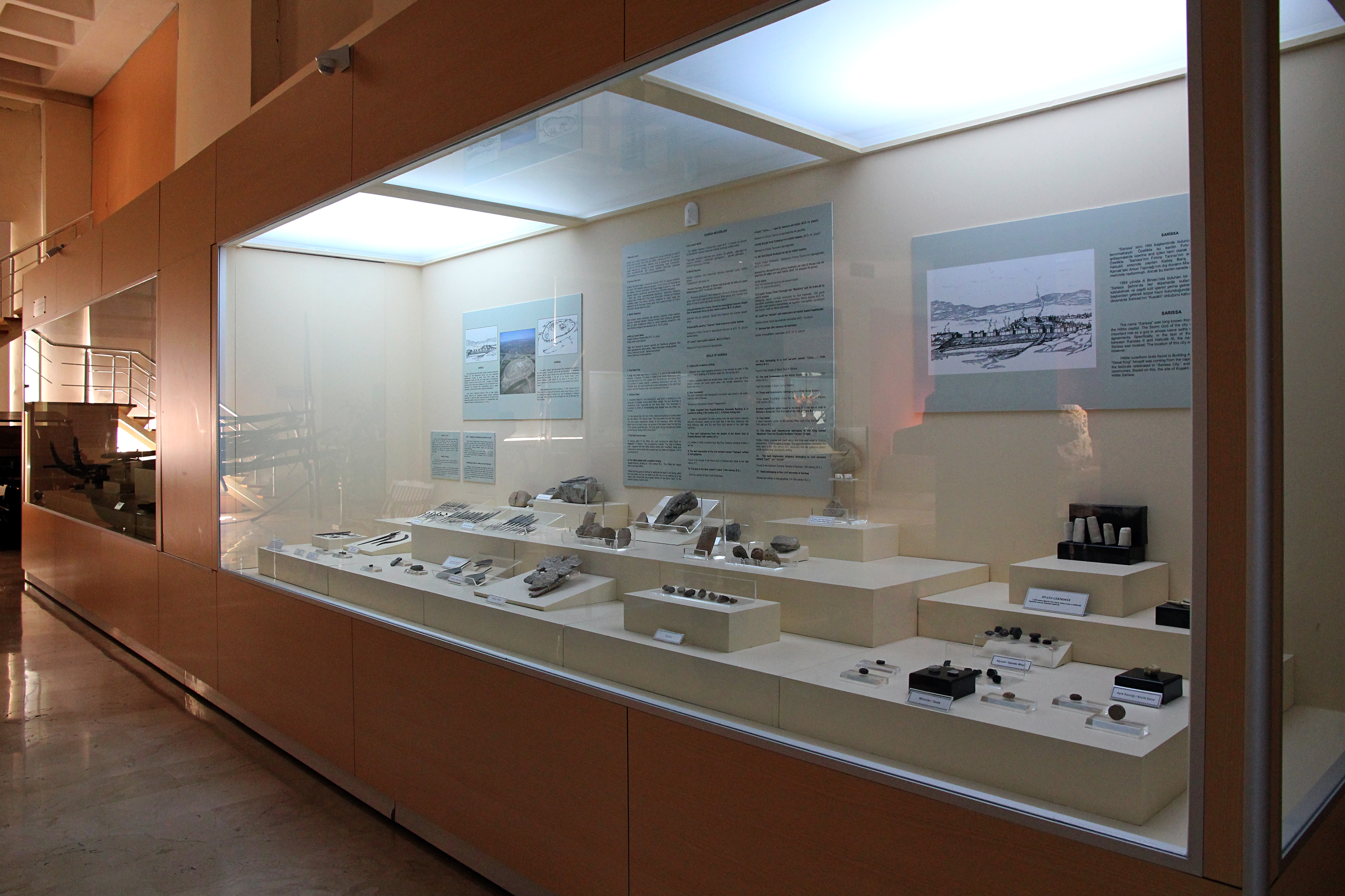 Archäologisches Museum Sivas, Zentraltürkei, Funde aus Kuşaklı